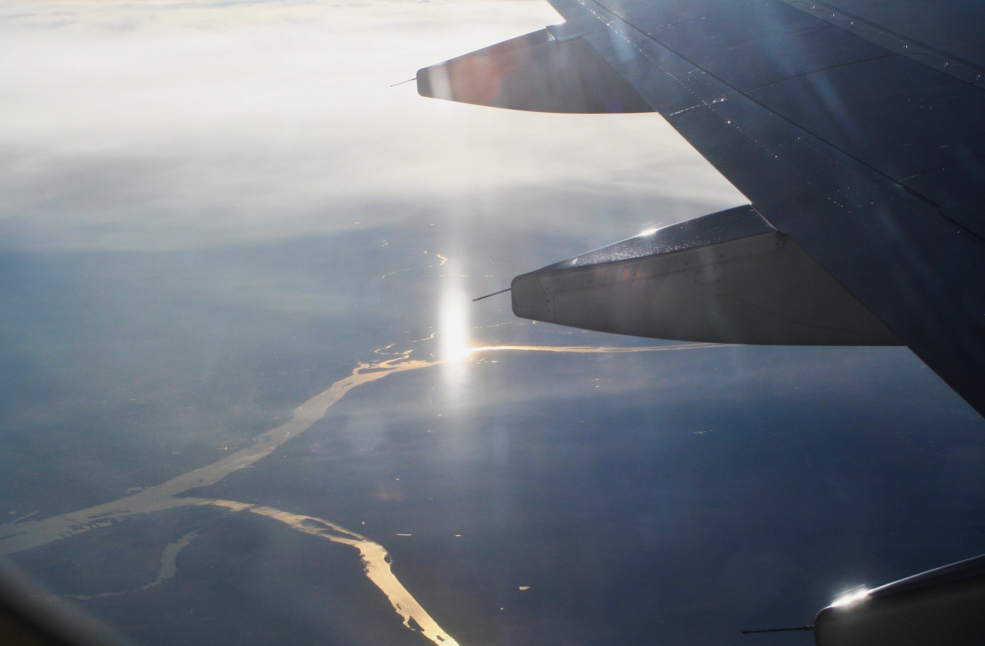 Subsun over Canada